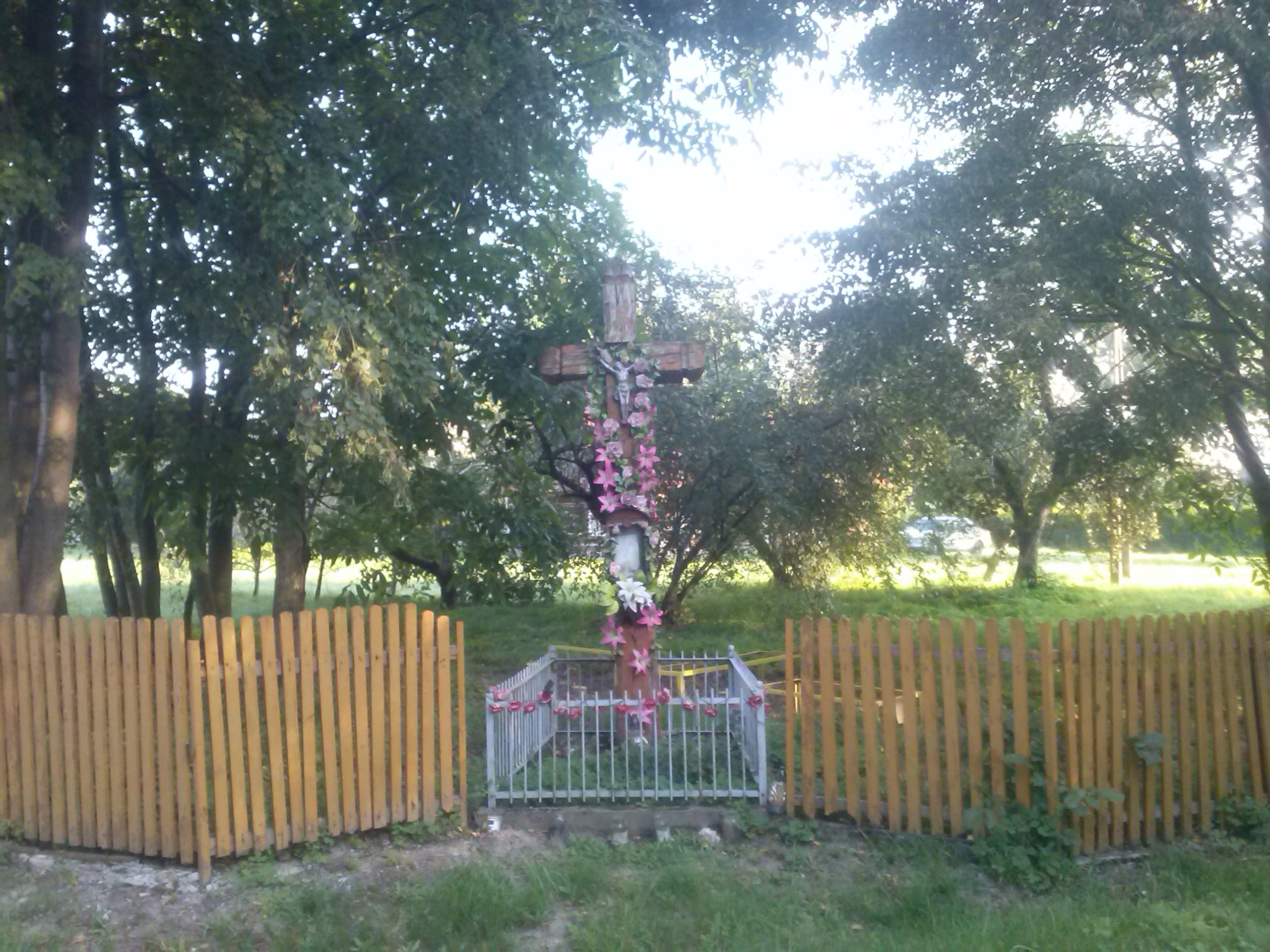 Krzyż w Woli Buchowskiej (Dąbrowie)